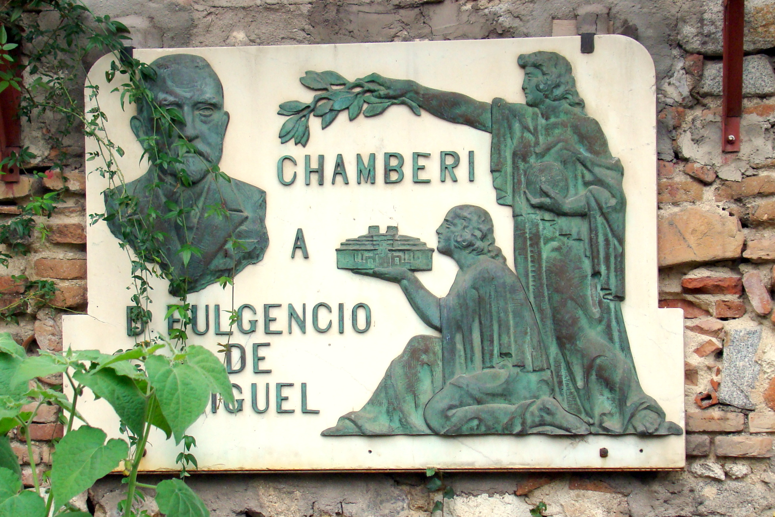 En el vivero de estufas del Retiro, cerca de la entrada de visitantes, me llamó la atención esta olvidada placa. No tenía ni idea de quién fue el tal Fulgencio de Miguel y el motivo de haber acabado su placa en un sitio tan escondido. En la página Biografías de gentes de Guadalajara leo que nació en Imón (Guadalajara) en 1863 y murió en Madrid en 1935. Tenía un próspero comercio de ultramarinos en la Plaza de Olavide, y fue, según se indica, el ideador y promotor de la construcción del ya desaparecido Mercado de Olavide. Tambien señala la citada página que, en su homenaje, se acordó la colocación de esta placa en el citado mercado, y que una triste casualidad hizo que precisamente el día en que debía procederse al descubrimiento de la placa, falleciera Don Fulgencio de Miguel (5 de septiembre de 1935). No he localizado más referencia a esta triste casualidad, pero sí aparece la noticia del descubrimiento de la placa que tuvo lugar el día 13 de septiembre (ABC de los días 13 y 14 de septiembre de 1935). Para más detalles sobre la biografía de este personaje me remito a Biografías de gentes de Guadalajara En la placa, además de la efigie del homenajeado, se observan dos figuras alegóricas, una de ellas sostiene en sus manos la singular edificación del Mercado de Olavide.